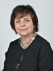 Antonella faggi, politica italiana